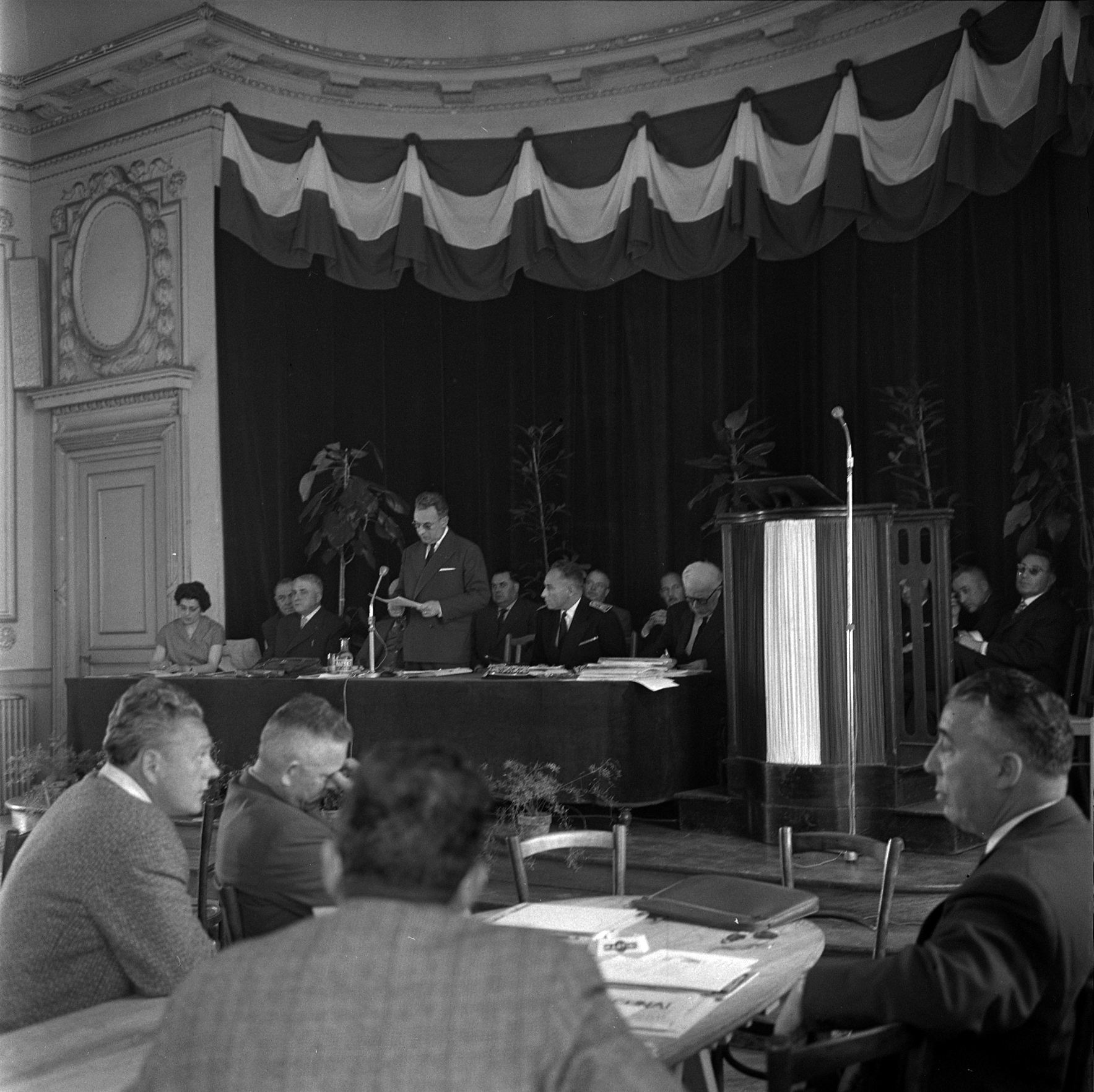 Palais Consulaire (CCIT), salle Gaston Doumergue. 15 juin 1961 Vue d'ensemble : congressistes assis à différentes tables ; en arrière-plan tribune où plusieurs personnes sont assises, au centre un homme est en train de faire une allocution (vue de face). Cliché pris lors du 34ème Congrés de l'orphelinat mutualiste des polices de France et d'Outre-Mer.